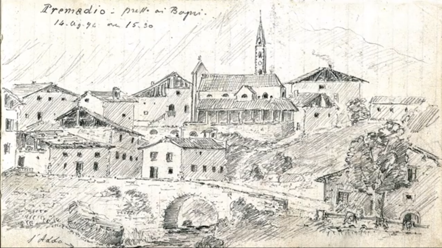 Il centro abitato di Premadio (Valdidentro). Disegno di Enrico Alberto d'Albertis tratto dai taccuini di viaggio del Capitano Enrico d'Albertis - Cure termali a Bormio 1894. Opera conservata dal Museo delle Culture del Mondo di Castello D’Albertis di Genova.